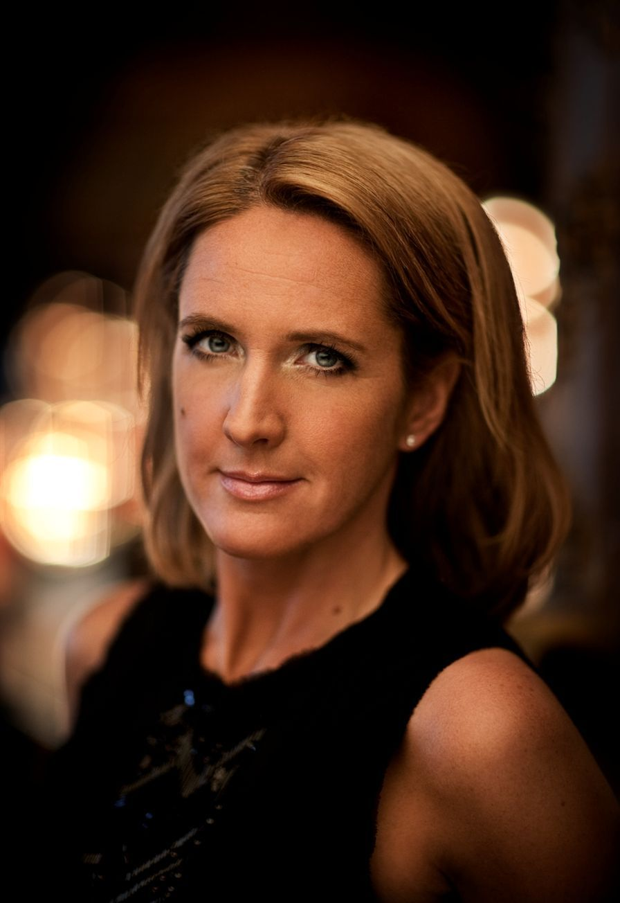 Författaren Denise Rudberg.